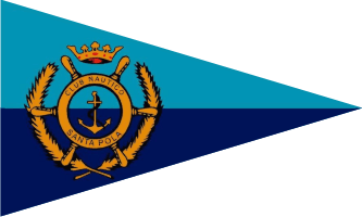 Grímpola del Club Náutico de Santa Pola